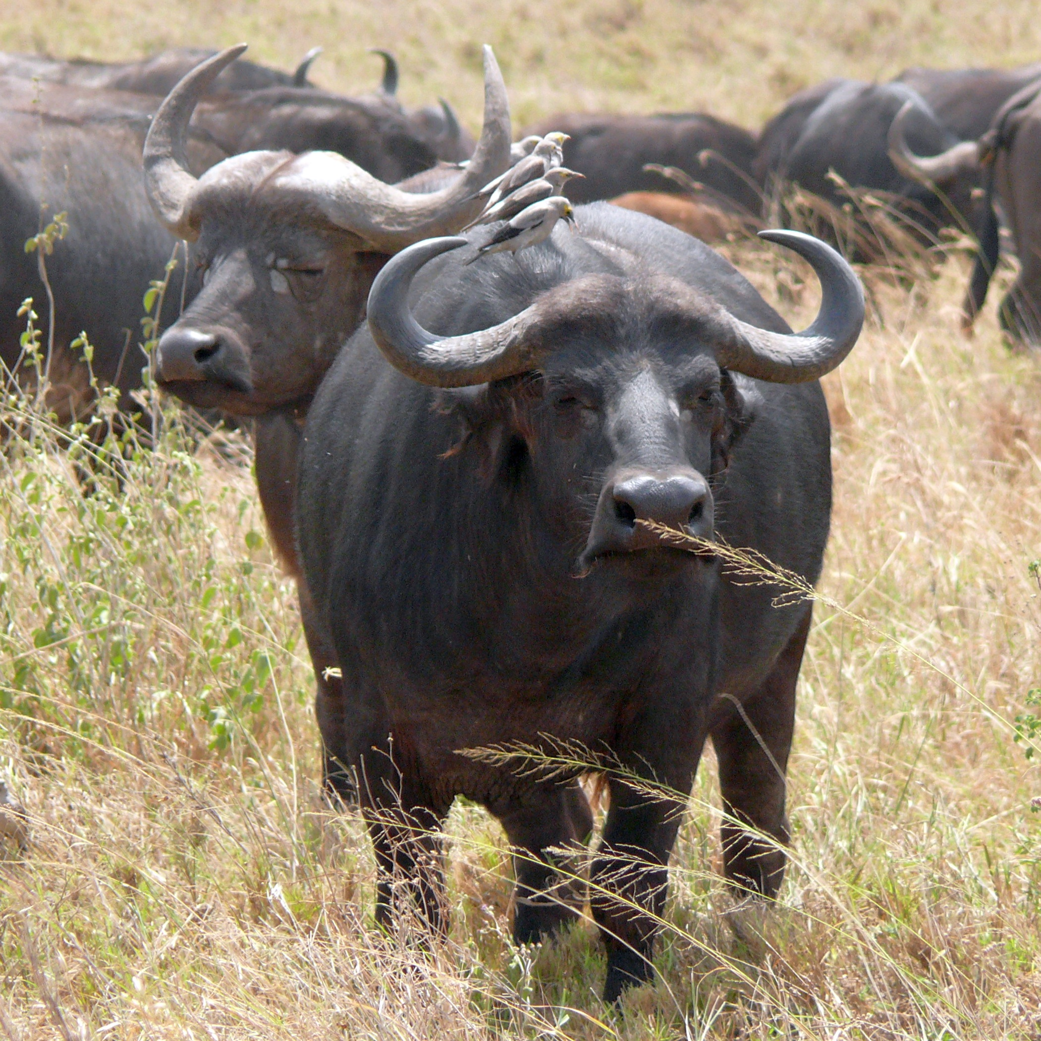 Afrikanische Büffel (Syncerus caffer)